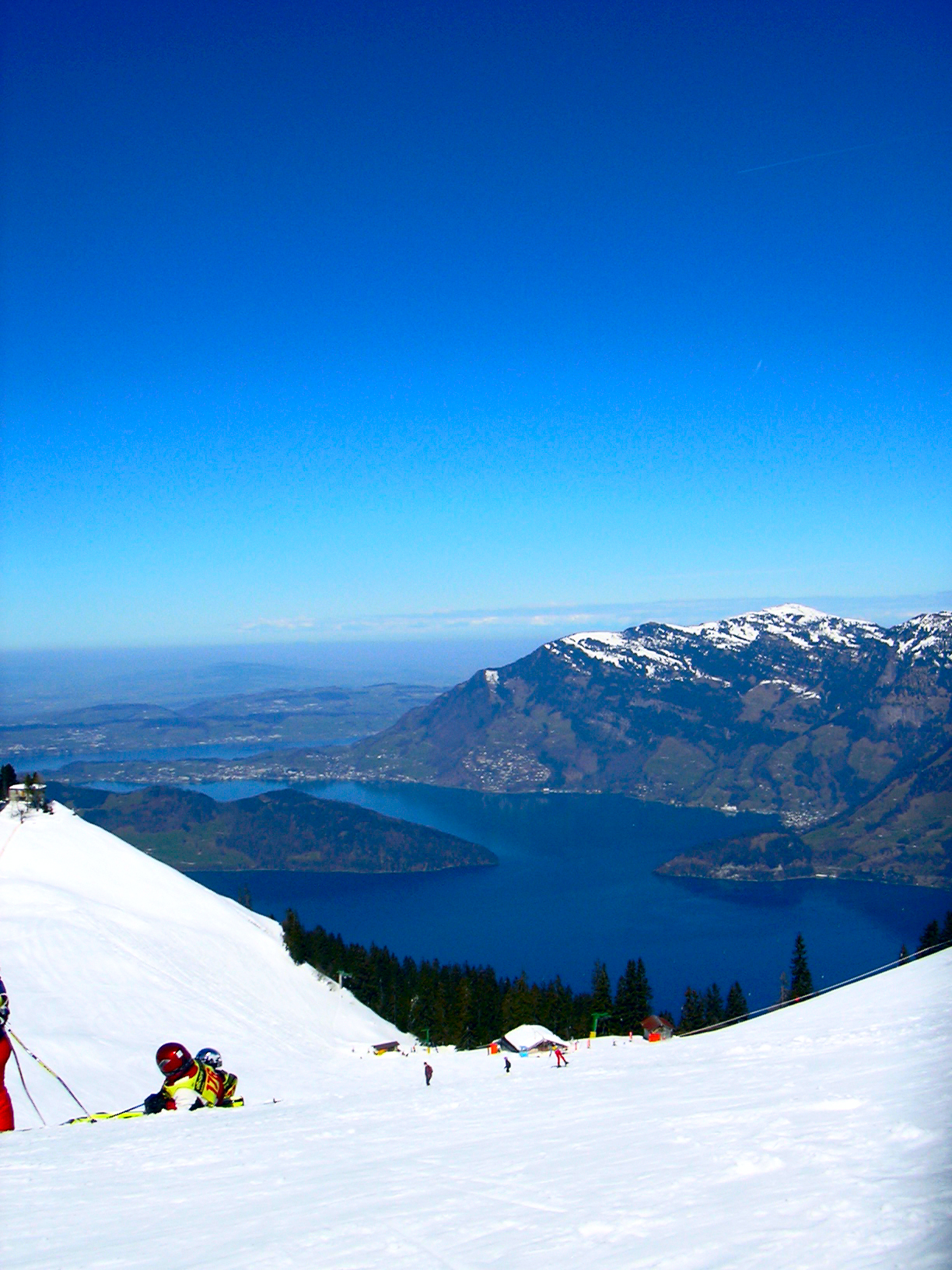 Klewenalp mit Aussicht auf den Vierwaldstättersee